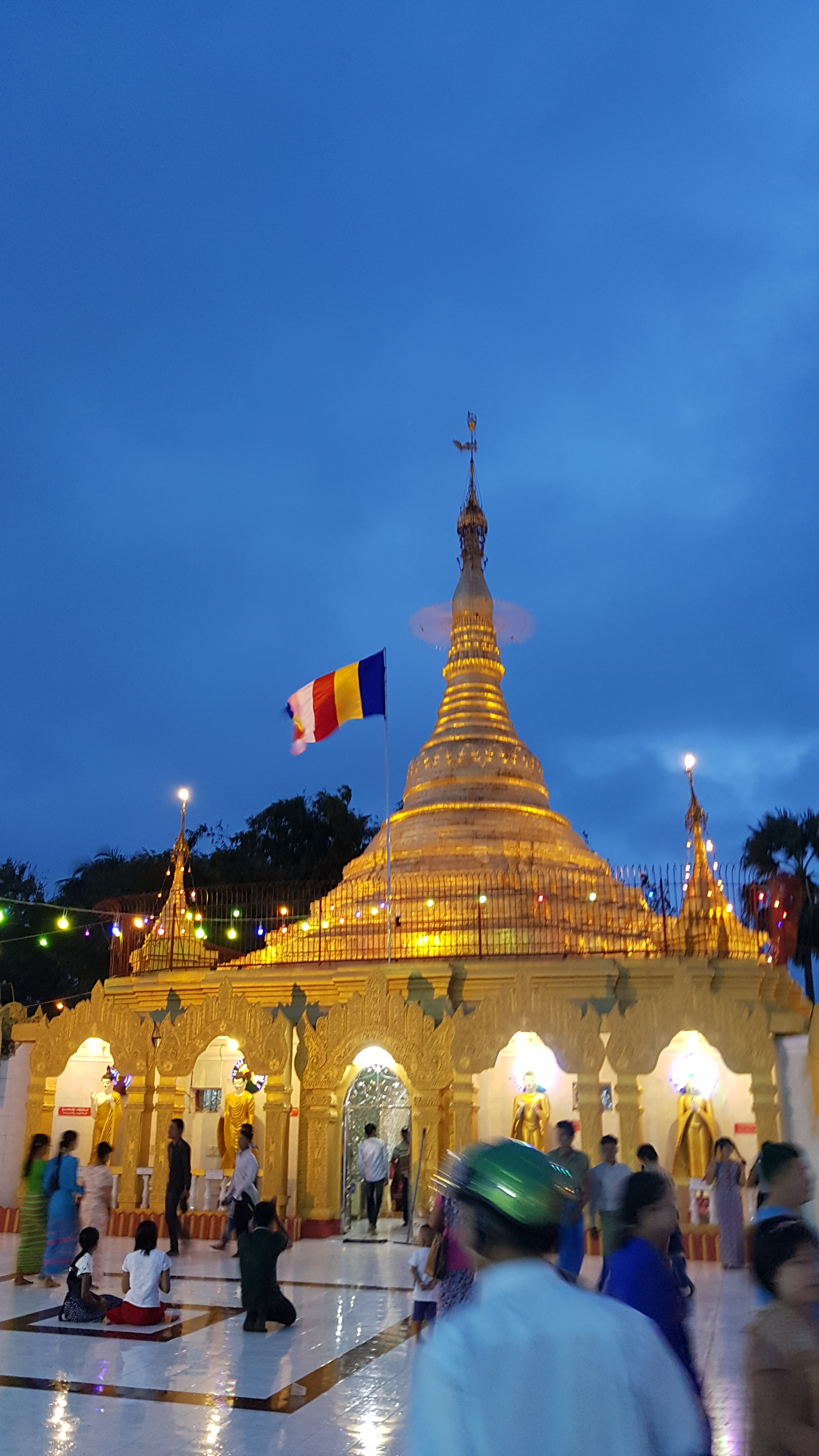 မြန်မာဘာသာ: ပြည်​​တော်​အေး​စေတီ​တော်